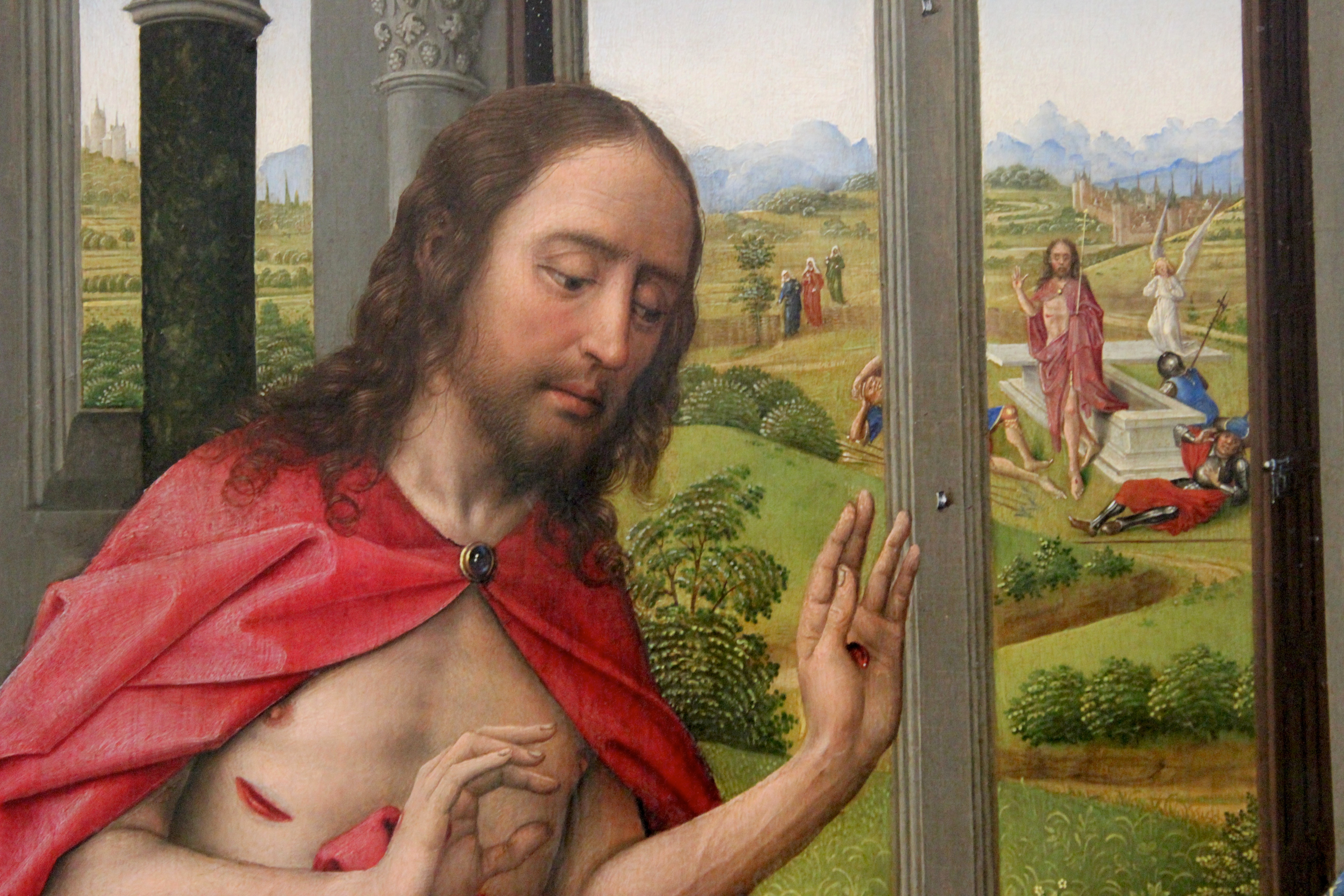 Berlín, Gemäldegalerie. Retablo de la Cartuja de Miraflores, Rogier van der Weyden.